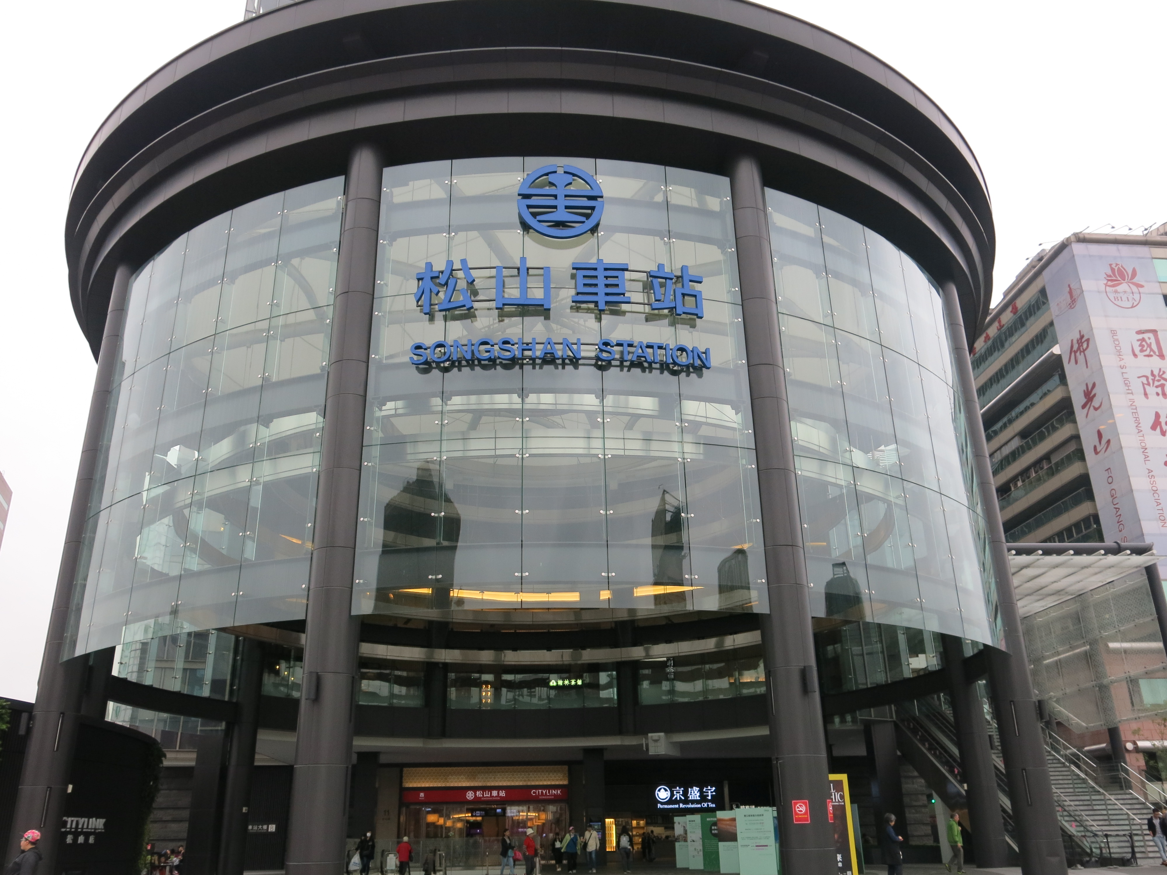 中文（台灣）: 台鐵松山車站(2016年04月)